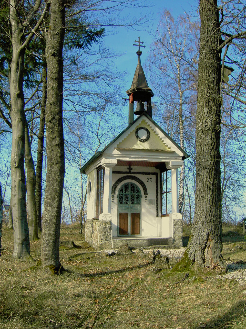 Marienkapelle (sog. Fehlner-Kapelle) bei Bittenbrunn (Gemeinde Ursensollen)